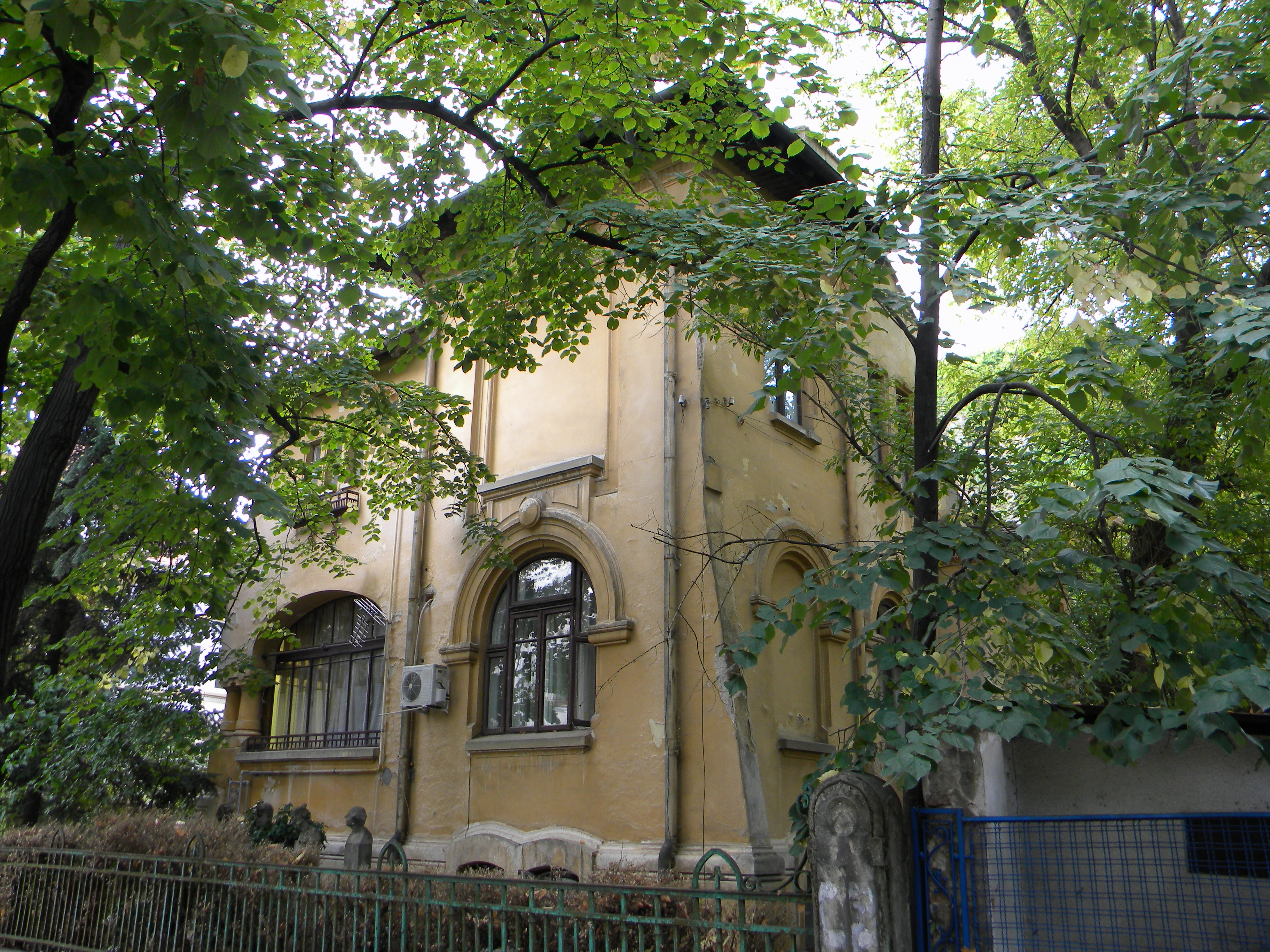 Bucuresti, Romania, Str. Rabat nr. 16, sect. 1 (Vila); B-II-m-B-19494